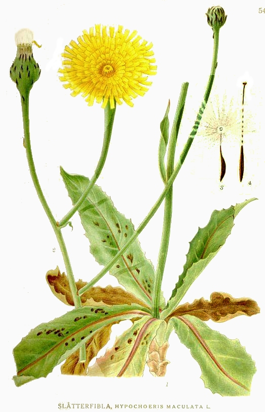 Original Description Slåtterfibla, Hypochoeris maculata L.